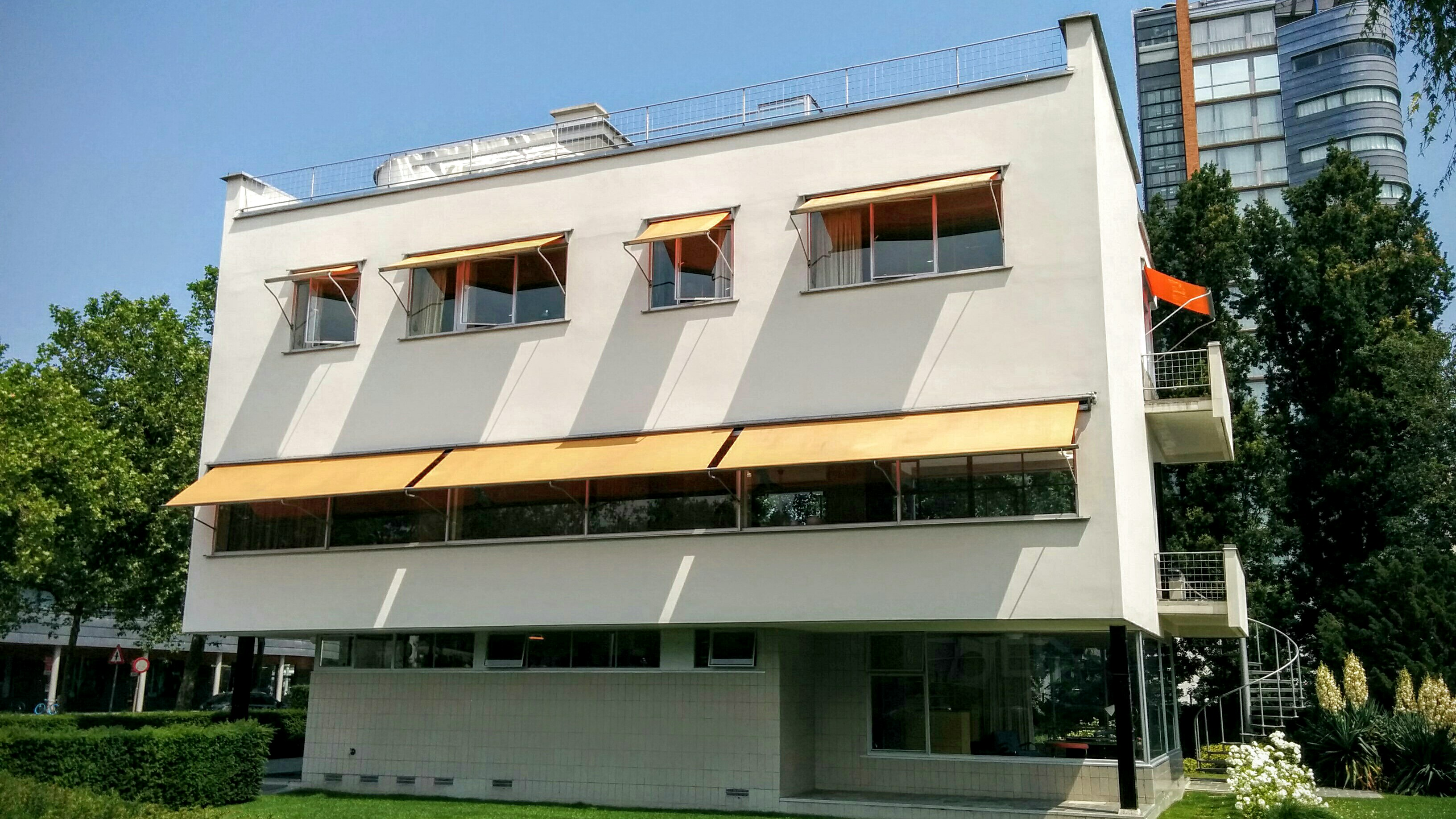 Villa Sonneveld, Rotterdam